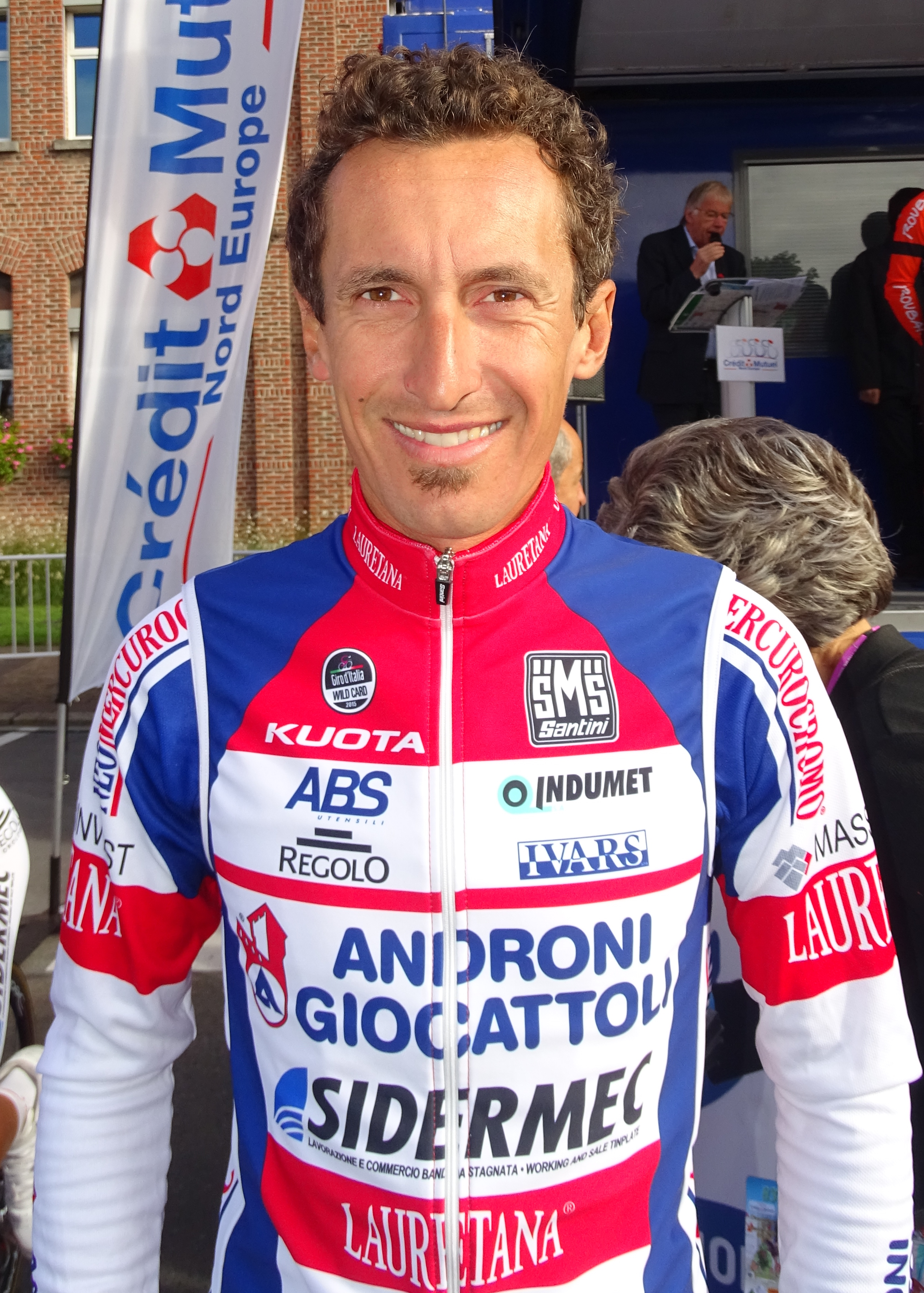 Reportage réalisé le dimanche 6 septembre à l'occasion du départ et de l'arrivée du Grand Prix de Fourmies 2015 à Fourmies, Nord-Pas-de-Calais, France.